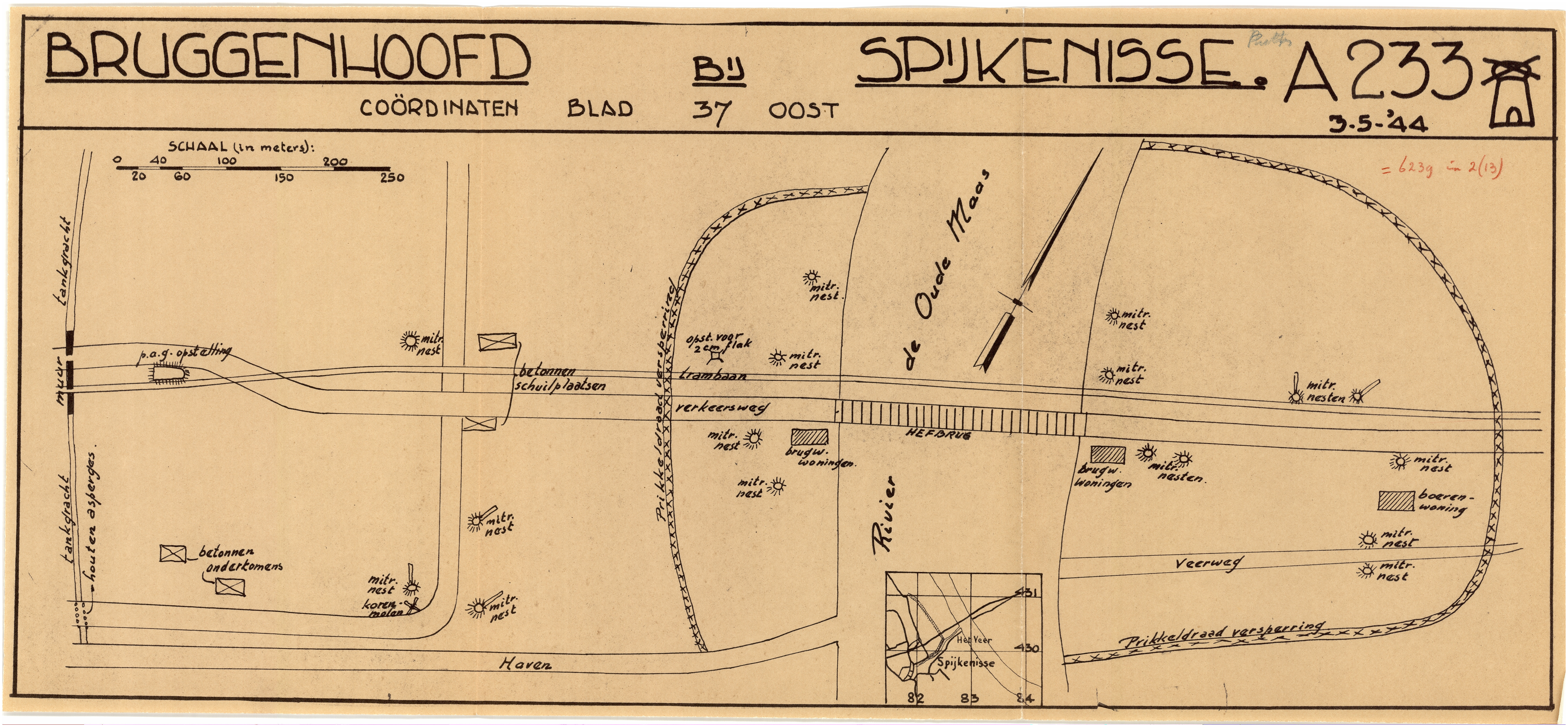 Clandestien gemaakte tekening van Bruggenhoofd Spijkenisse dd 3-5-1944, gemaakt door mensen van Rijkswaterstaat voor de illegale "Orde Dienst", die ze naar Engeland verzond. Bron: Spijkenisse in oorlogstijd / Jan de Baan (samenst.). - Spijkenisse: Gemeente Spijkenisse, 1990 (3e herz. dr), p. 22 Collectie Nederlands Instituut voor Militaire Historie, opgenomen in: 575 Bureau Inlichtingen/ Duitse verdedigingswerken (575-serie), 20 Voorne, Spijkenisse, Hellevoetsluis Bureau Inlichtingen (1941 - 1945), 1.1. Inlichtingen Binnenlandse Strijdkrachten: Kaarten van Duitse verdedigingswerken ( margriet, molen, vlag en kroon series), 1.1.1. Kaarten, rapporten en berichten betreffende Duitse verdedigingswerken naar plaats of regio - A 233 Molen, Locatie Duitse verdedigingswerken bij het bruggenhoofd bij Spijkenisse, waaronder mitrailleurnesten,Panzer Abwehr Geschütz (PAG)-opstellingen en bunkers, 03-05-1944